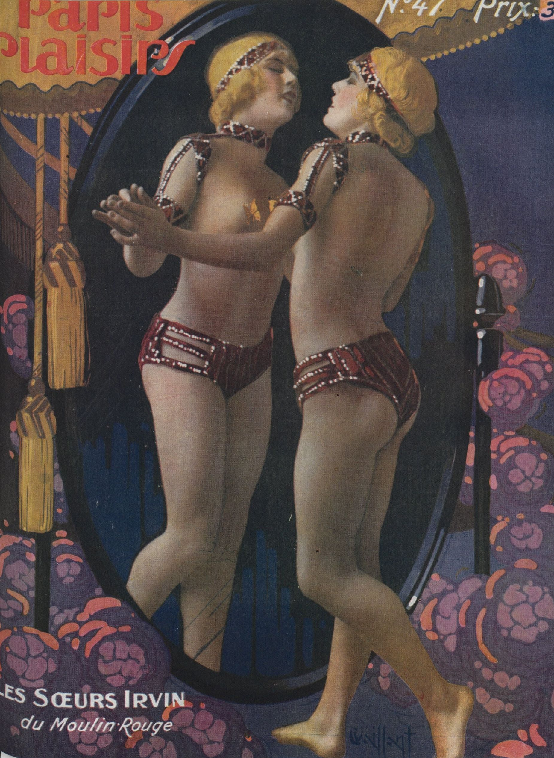 Les sœurs Irvin du Moulin-Rouge, parue dans "Paris-plaisirs" n°47, mai 1926